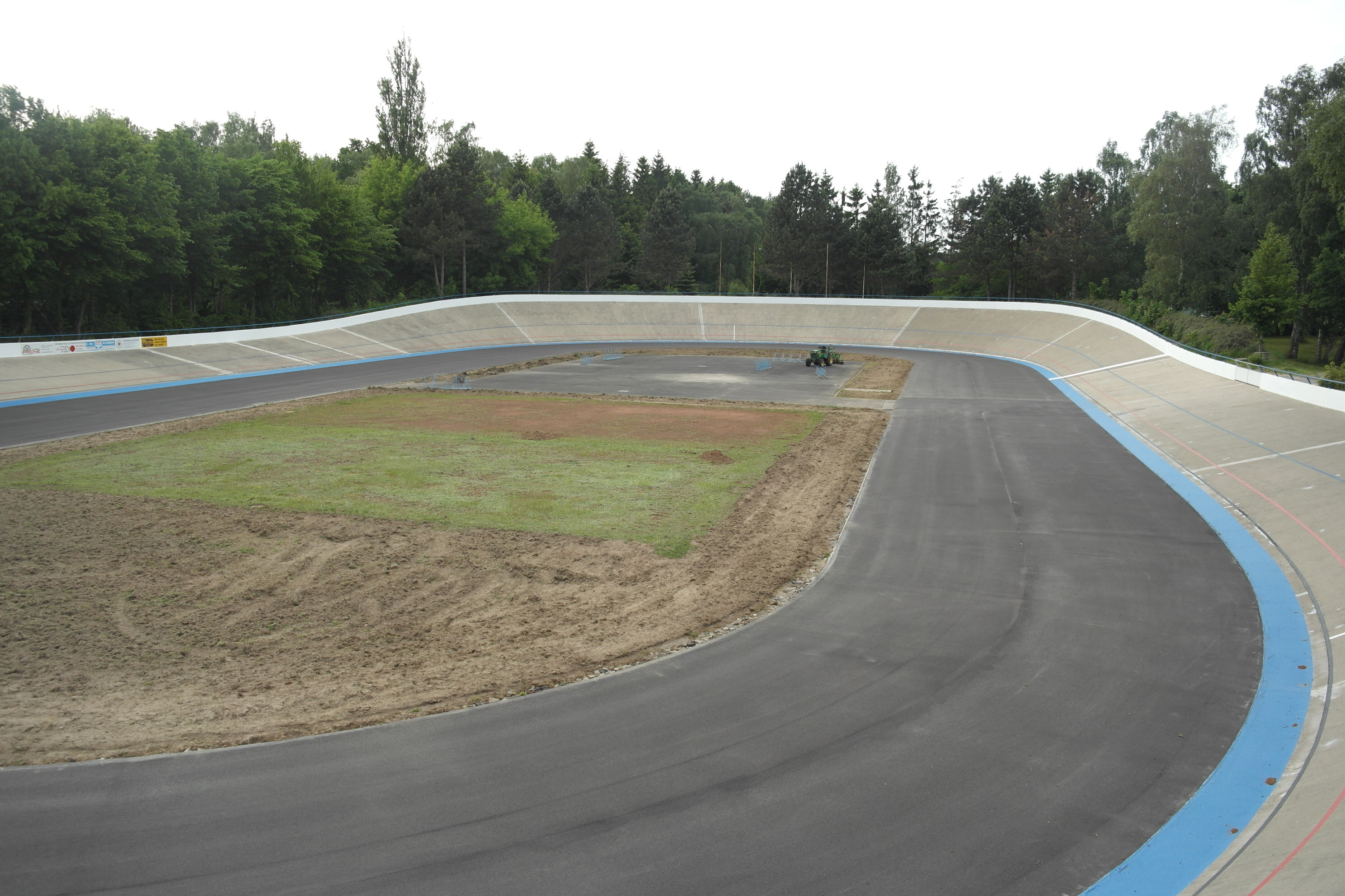 Radrennbahn Damerower Weg in Rostock, einBau von Ulrich Müther